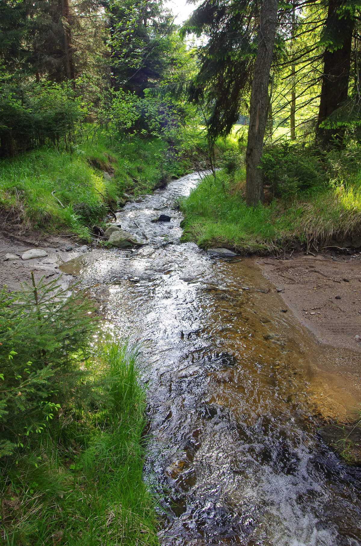 Chalupecký potok u obce Podstrání, Slavkovský les, okres Sokolov